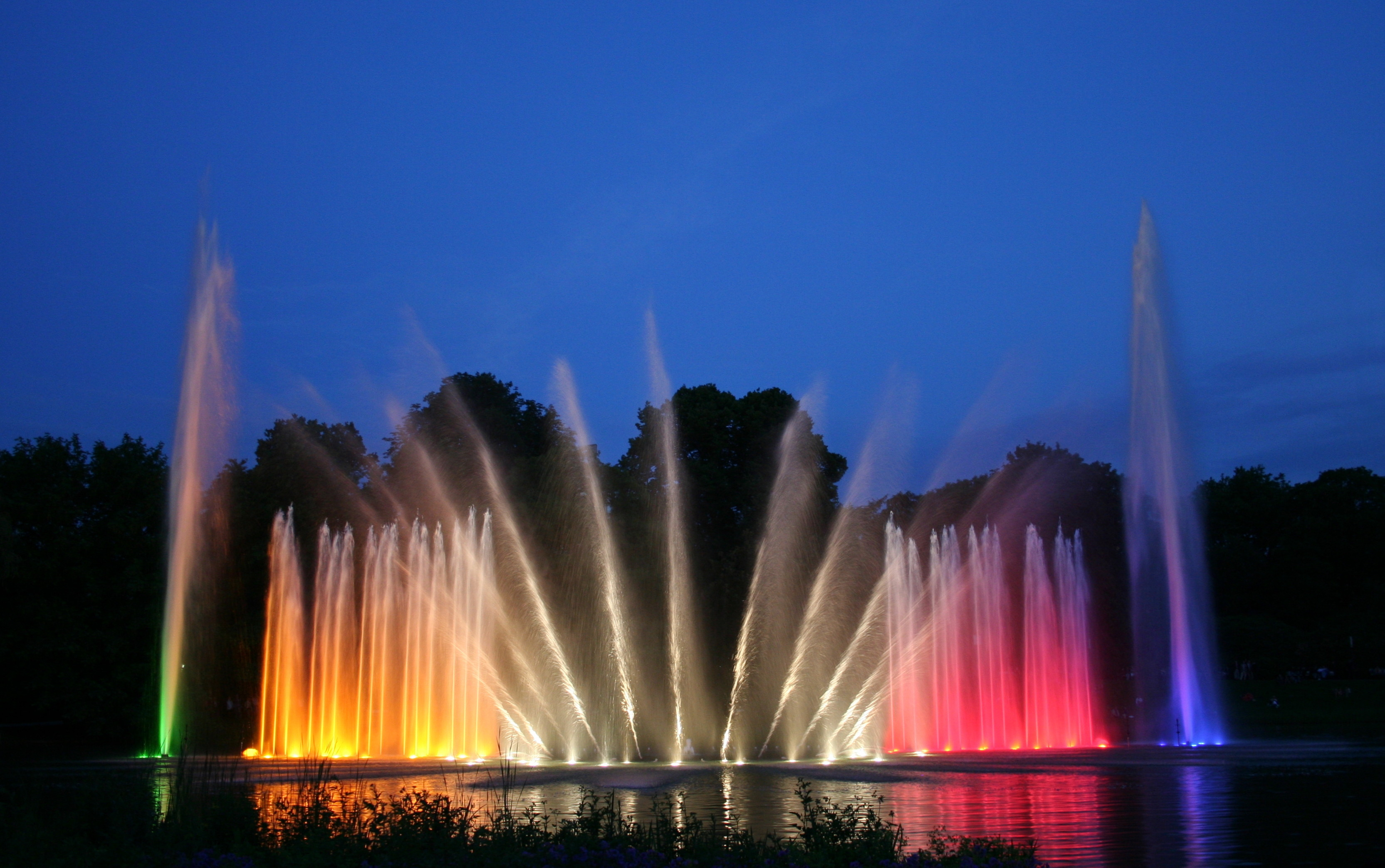 Wasserlichtkonzert in Planten un Blomen, Hamburg.